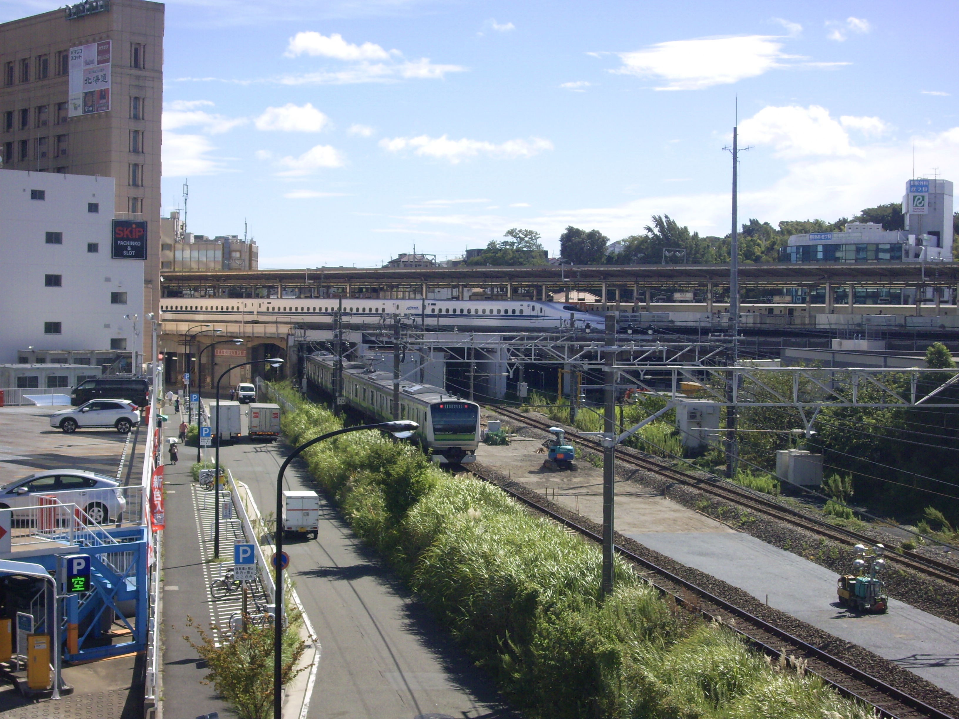 横浜線を乗り越える東海道新幹線の線路橋上新横浜駅 ㊟カメラを起動すると日付機能が出荷時のものに初期化されるため、ファイル履歴の投稿日時とメタデータの原画像データの生成日時が異なります（本概要欄の下記日付が撮影日）